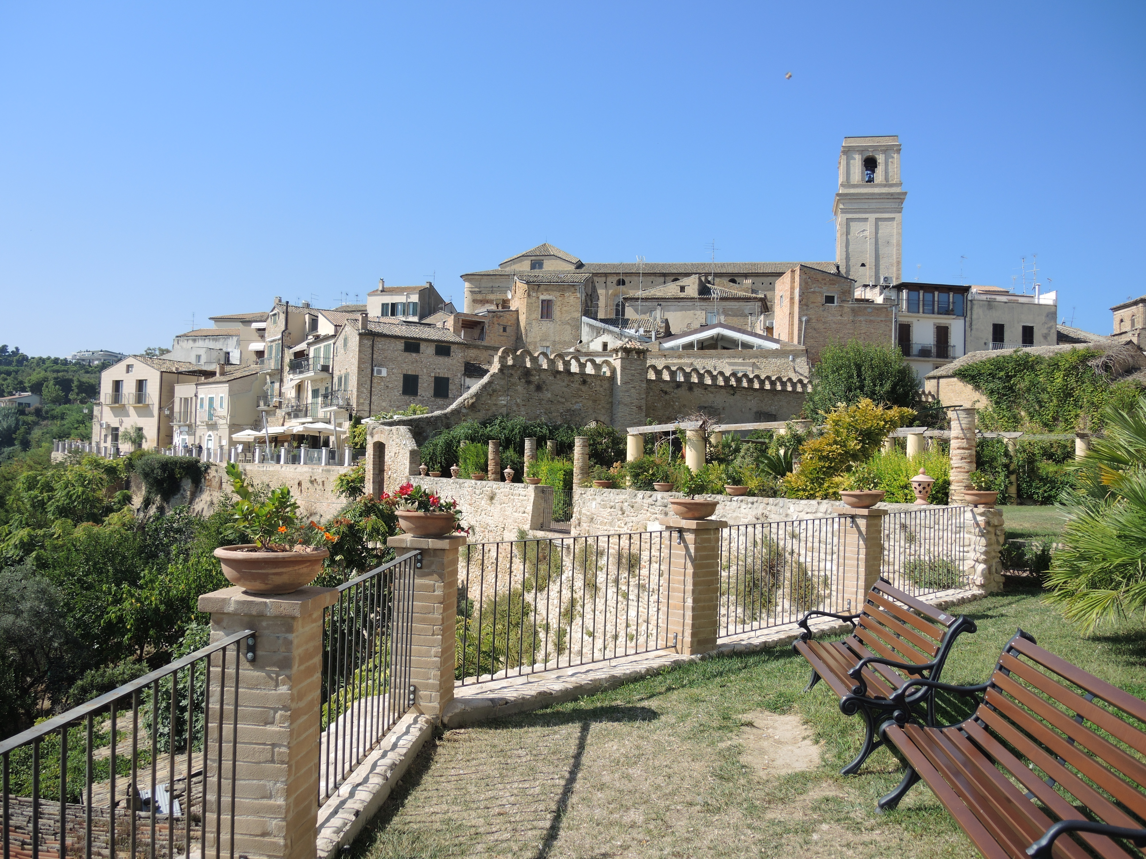 Giardini napoletani This is a photo of a monument which is part of cultural heritage of Italy.